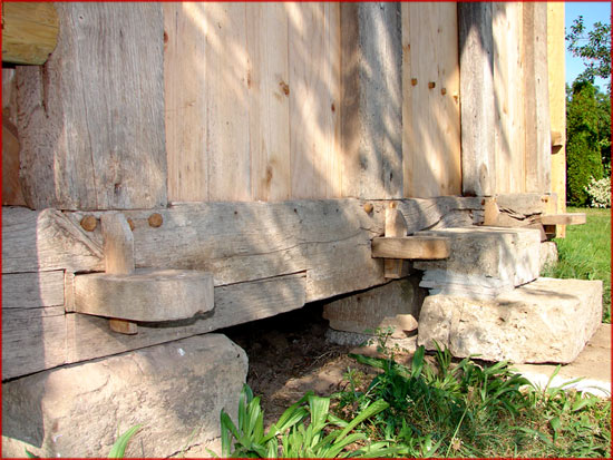 L'assemblage spécifique, en tenons et mortaises, des chalots (ou chellos).